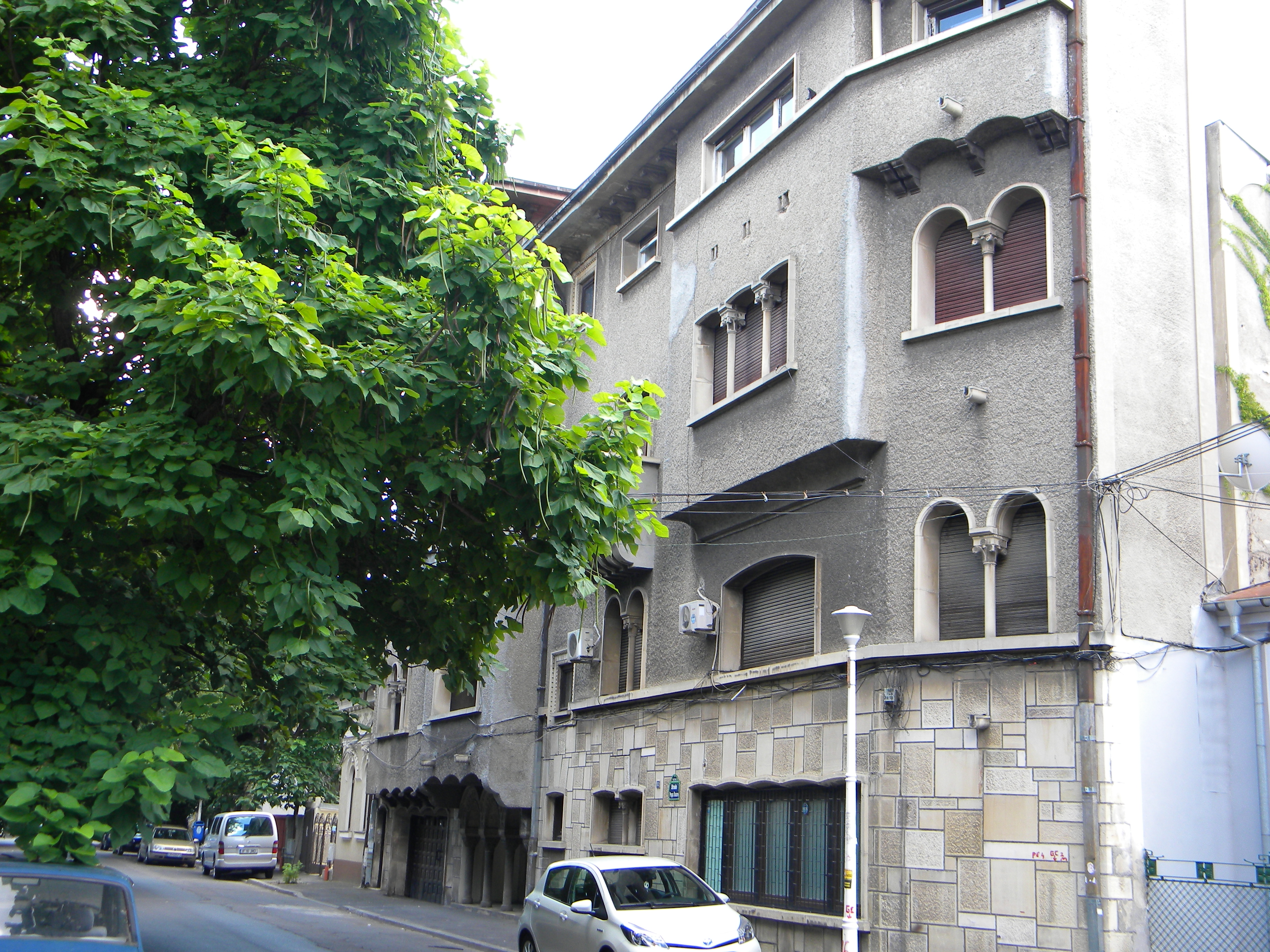 Bucuresti, Romania. Casa pe Str. Popa Soare nr. 52, sect. 3. B-II-m-B-19456 (imagine de pe colt)